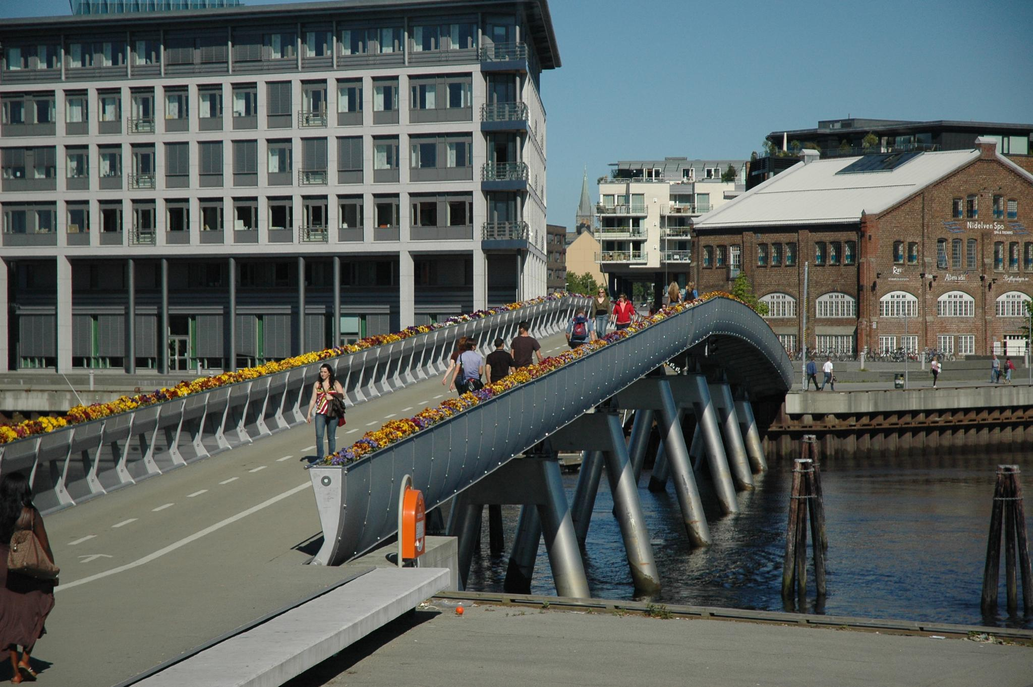 Verftsbrua in Trondheim.